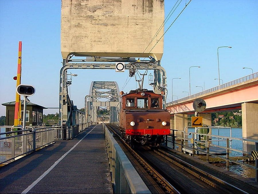 Stockholm Södra Lidingöns Järnväg lok nr 200 vid Lidingöbron.